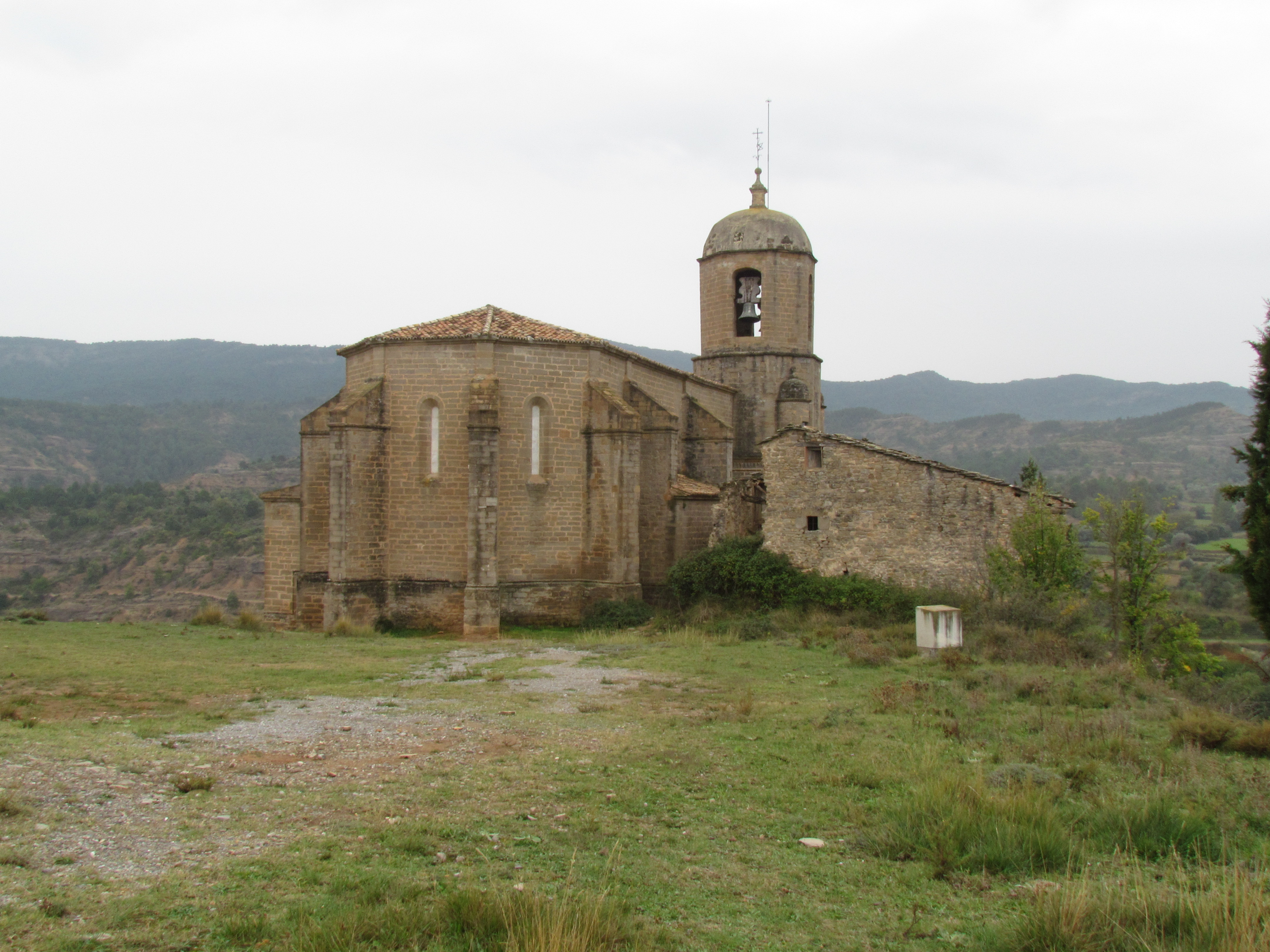 Exterior del ábside de la iglesia de Santa Eulalia de Olsón.